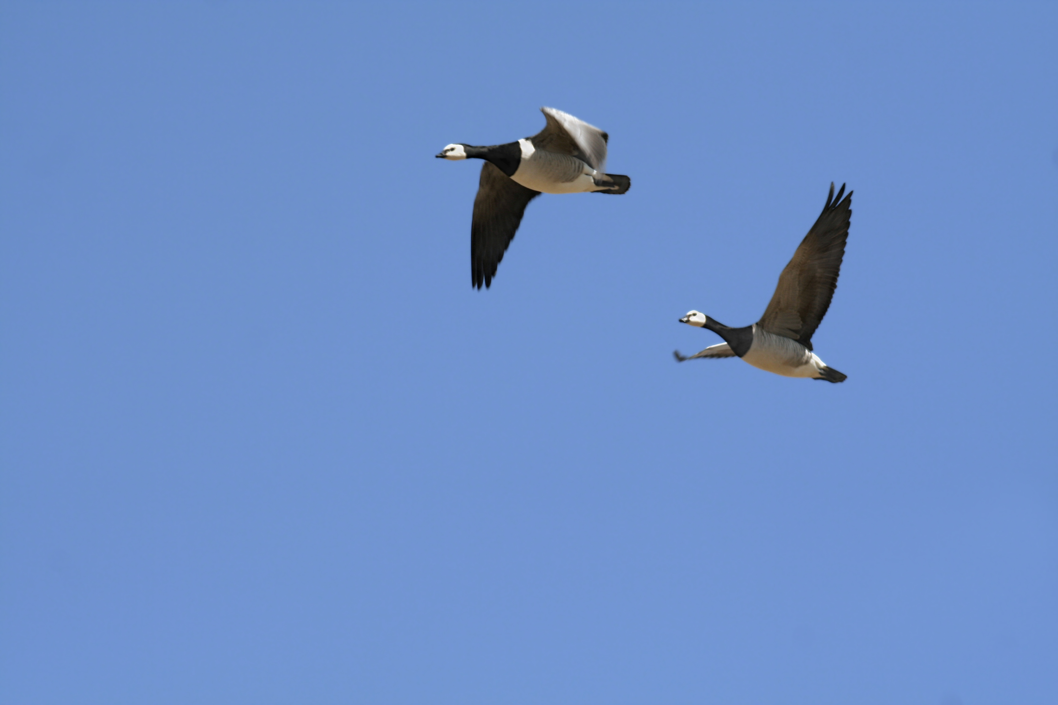 Valgepõsk-lagle taeva taustal